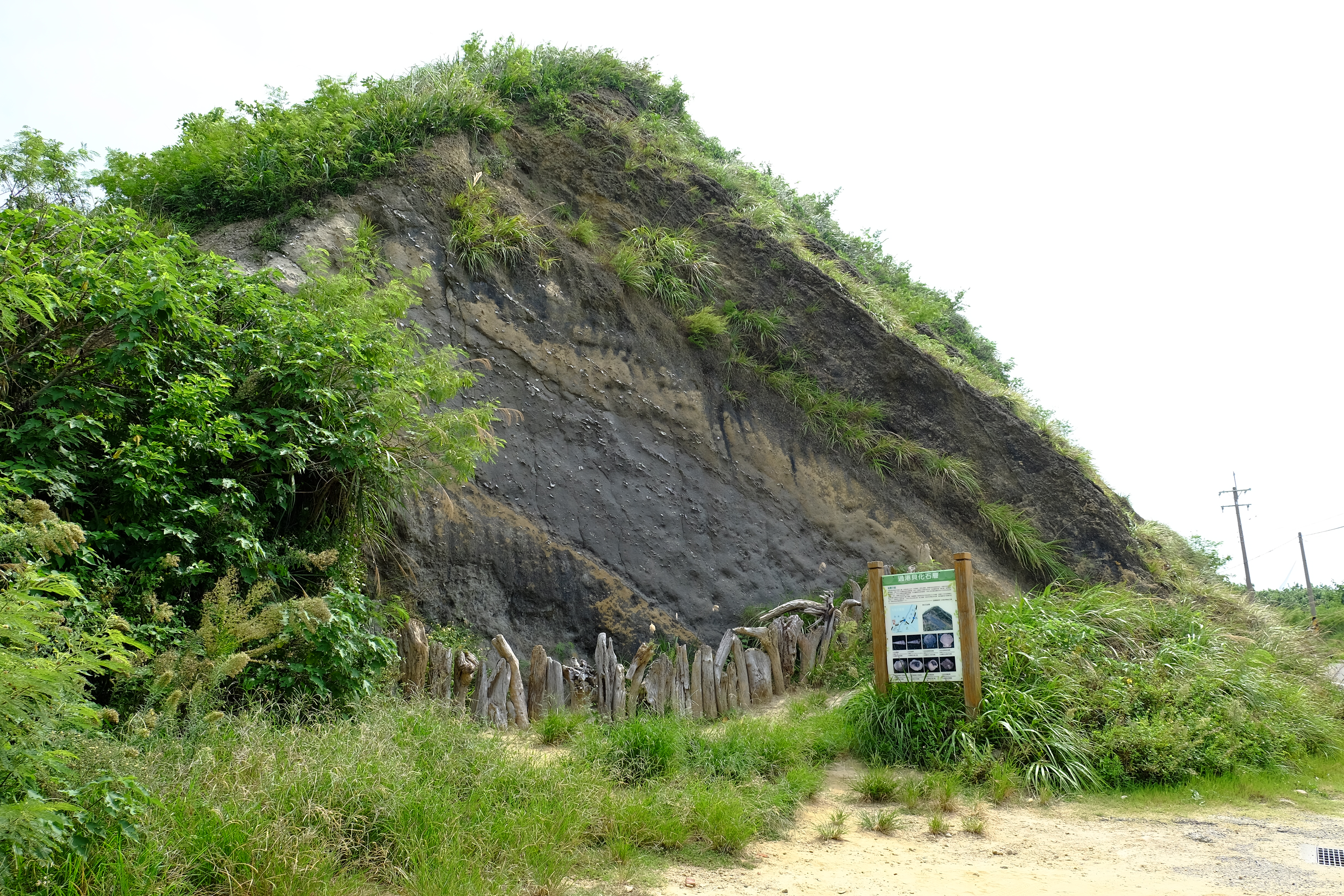 2016年過港貝化石層